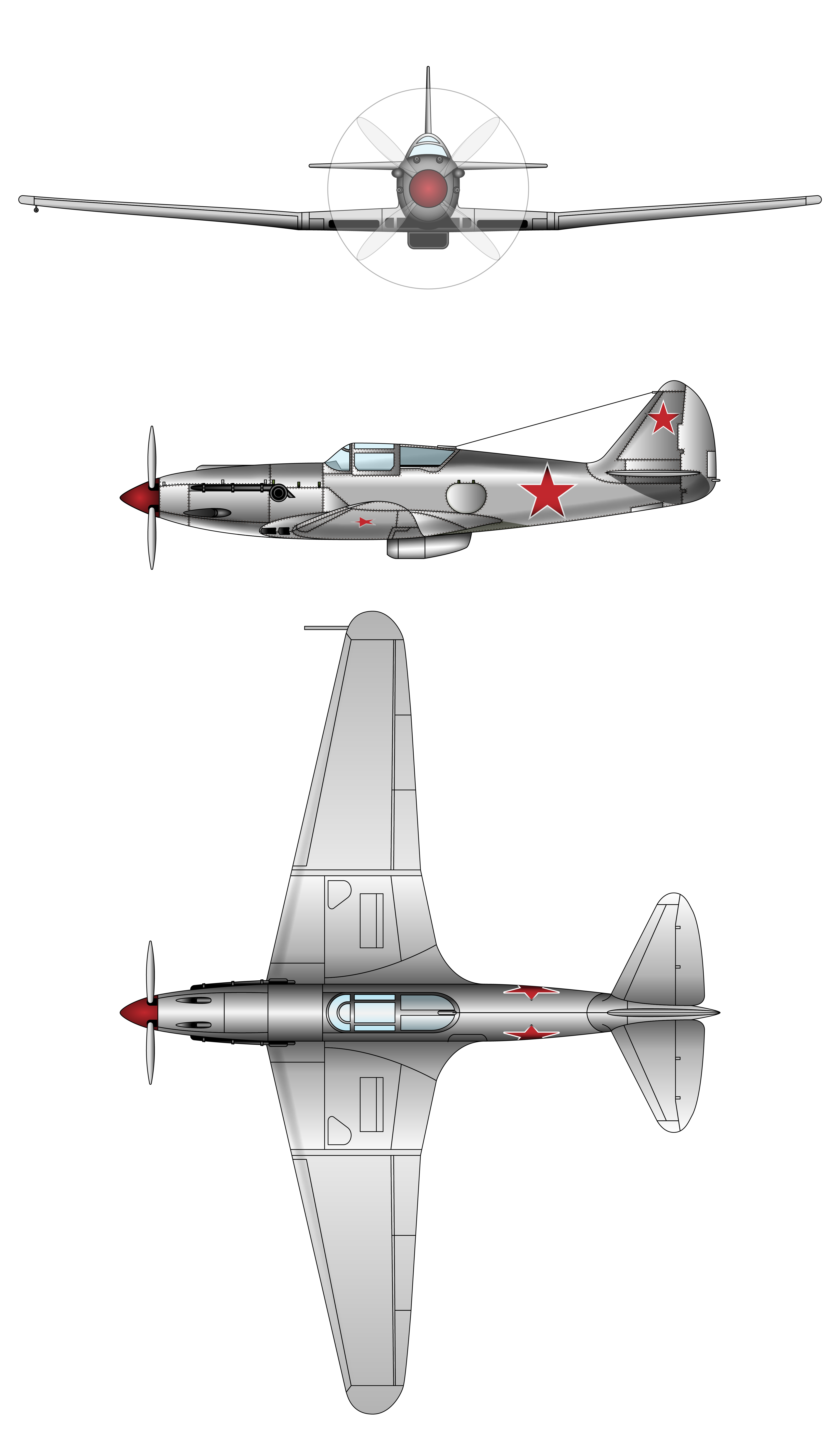 Mikojan-Gurevich I-221